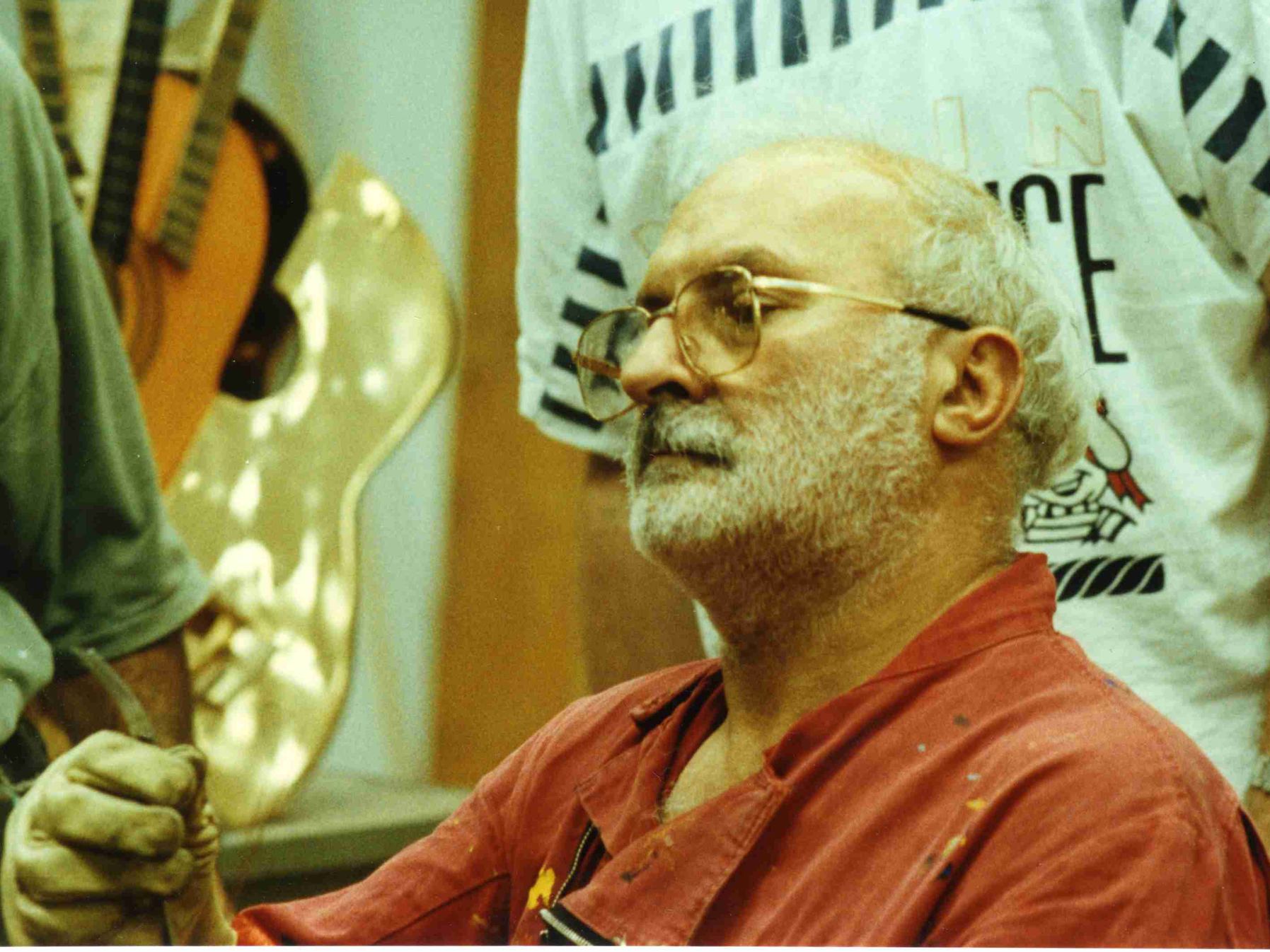 Arman dans son atelier de sculture-soudure à Vence en 1989